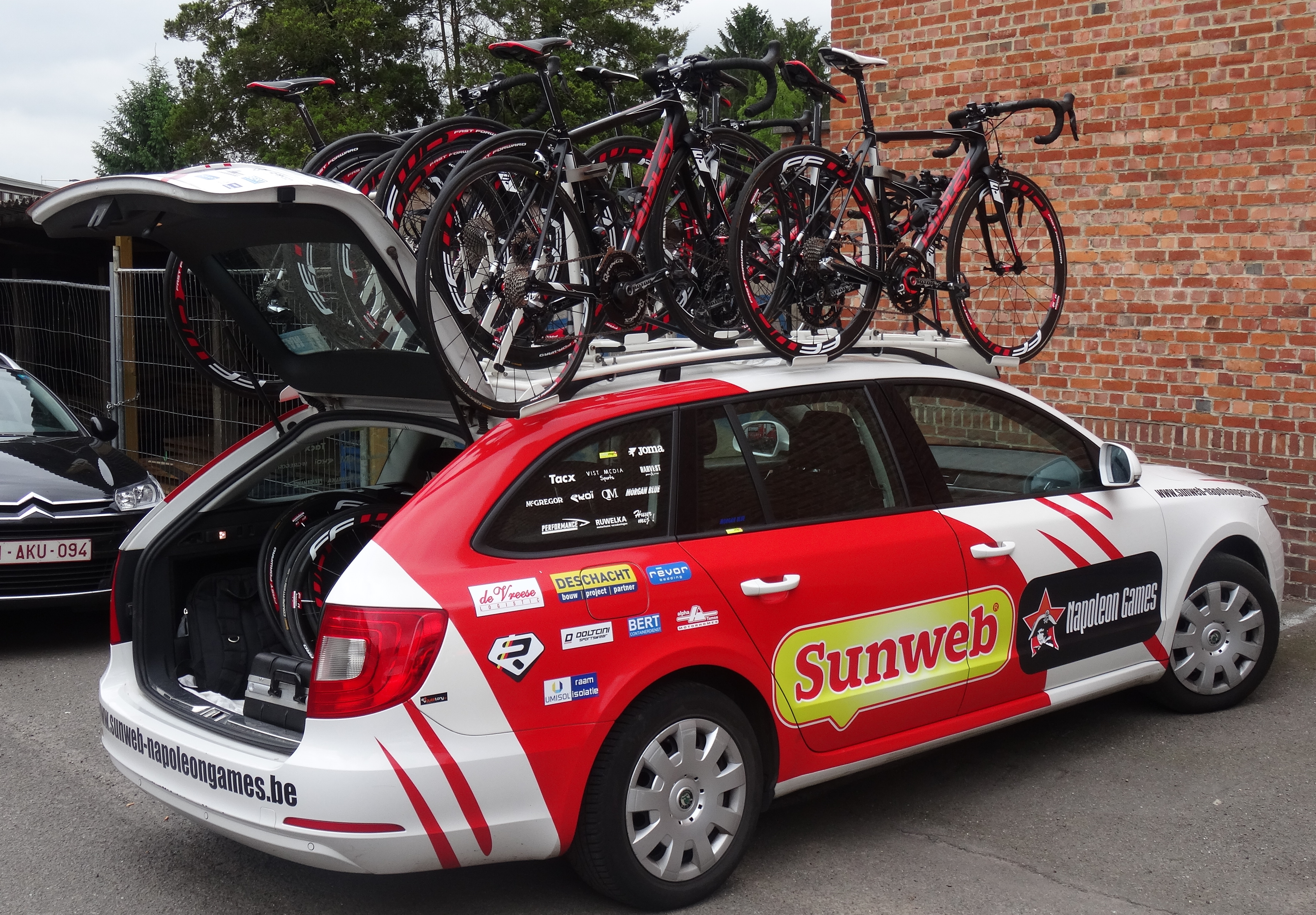 Reportage photographique réalisé le dimanche 15 juin à l'occasion du départ et de l'arrivée du Tour du Limbourg 2014 à Tongres, Belgique.